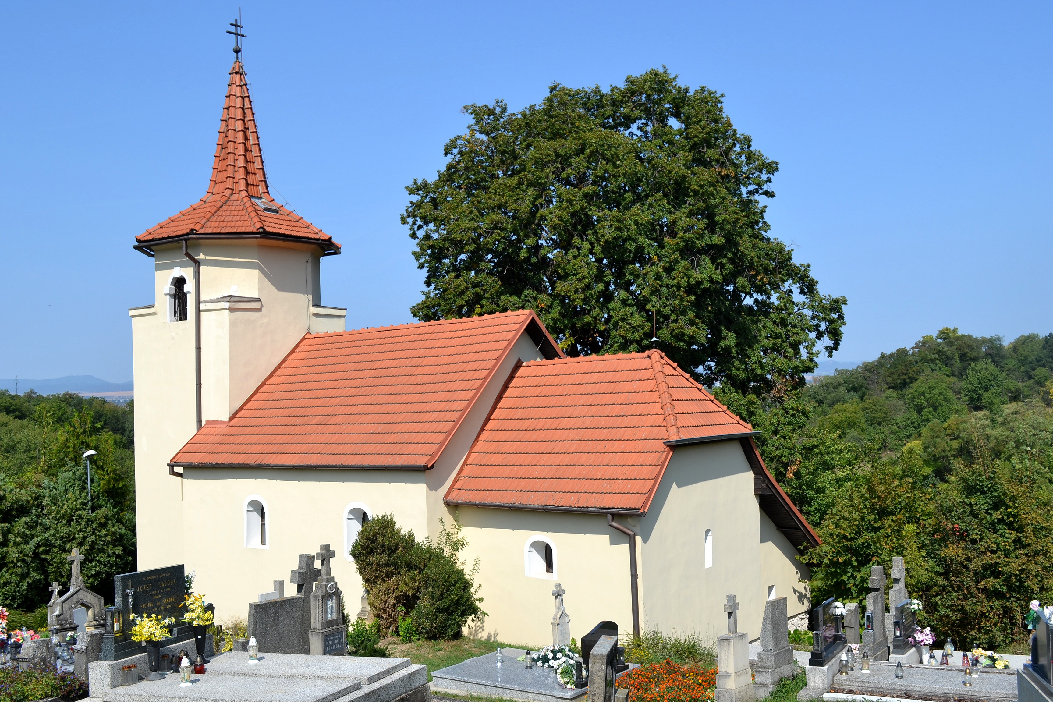 Ratnovce (okr. Piešťany), Kostol svätej Margity Antiochijskej; celkový pohľad